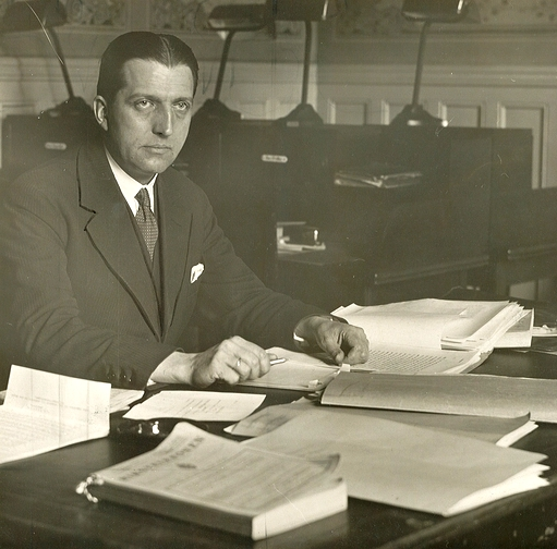 portrett, mann, forfatter, pressemann, sjef for Statens filmkontroll, sittende halvfigur ved skrivebord.